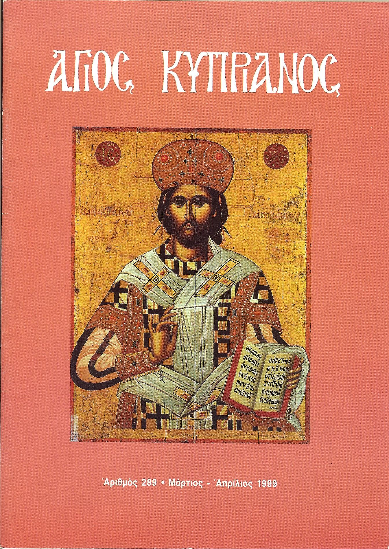 Обложка журнала Ἅγιος Κυπριανὸς c иконой Иисус Христос Великий Архиерей.